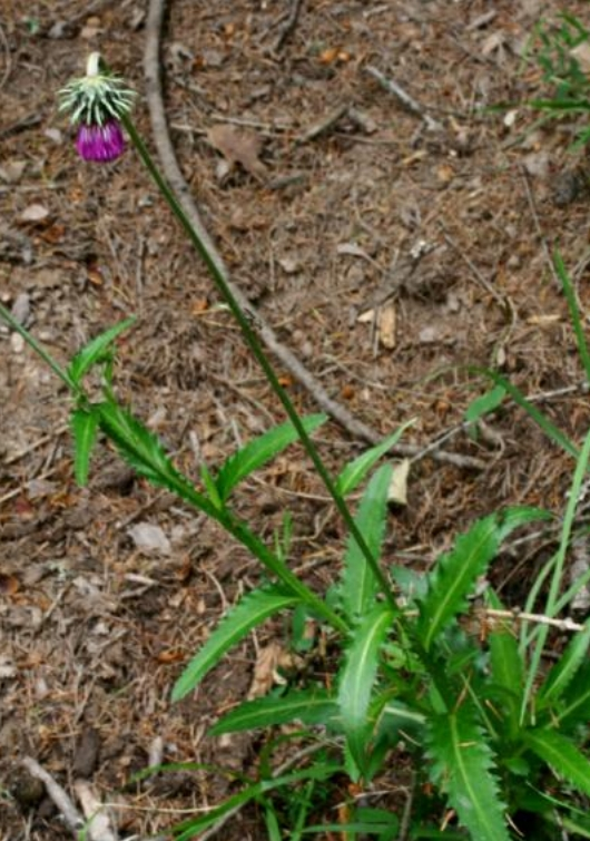 Carduus defloratus